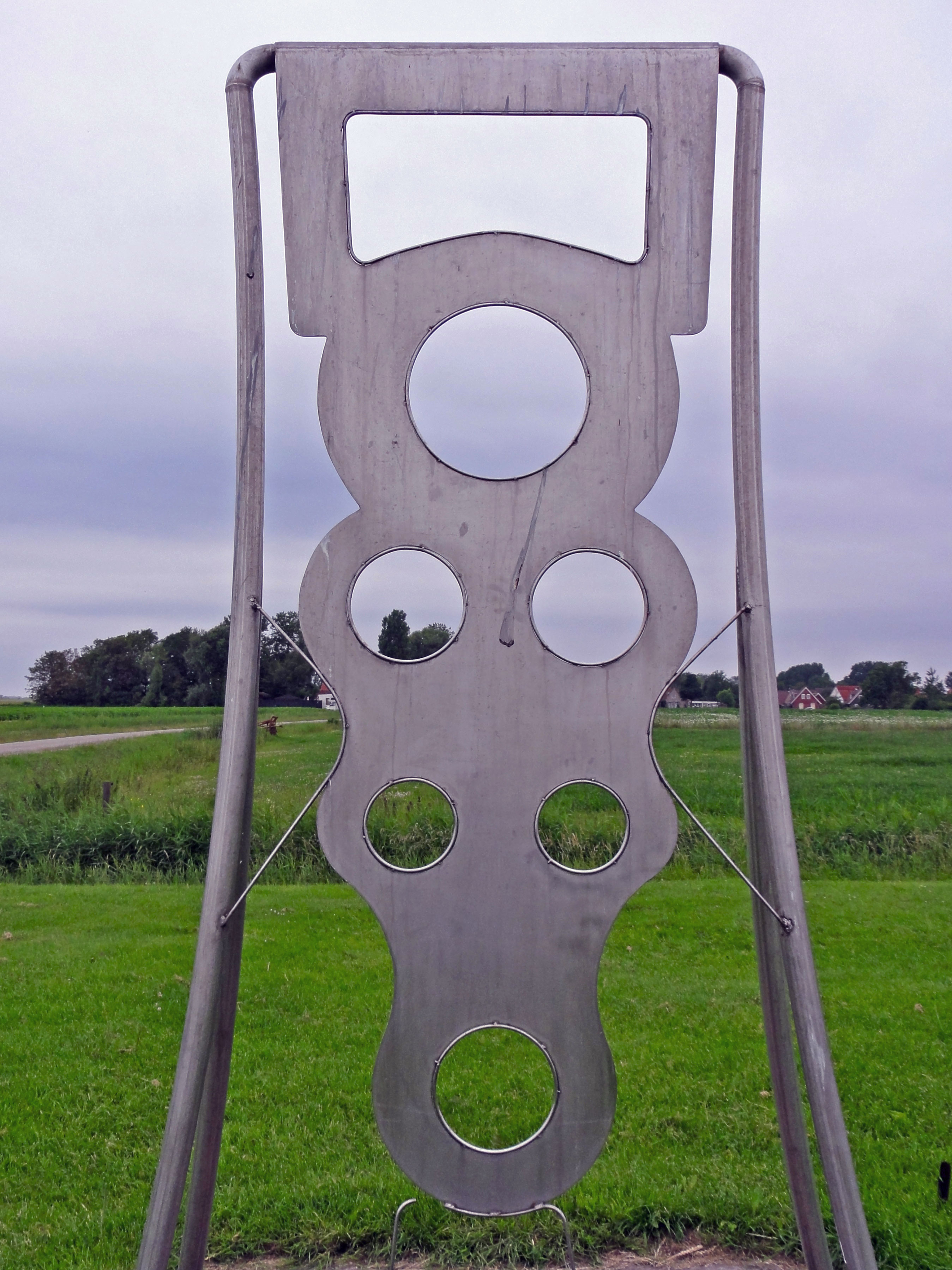 "Fibula" nabij Wijnaldum t.g.v. de eerste Slachte marathon op 8 juli 2000, een verwijzing naar de in een terp bij Wijnaldum gevonden fibula